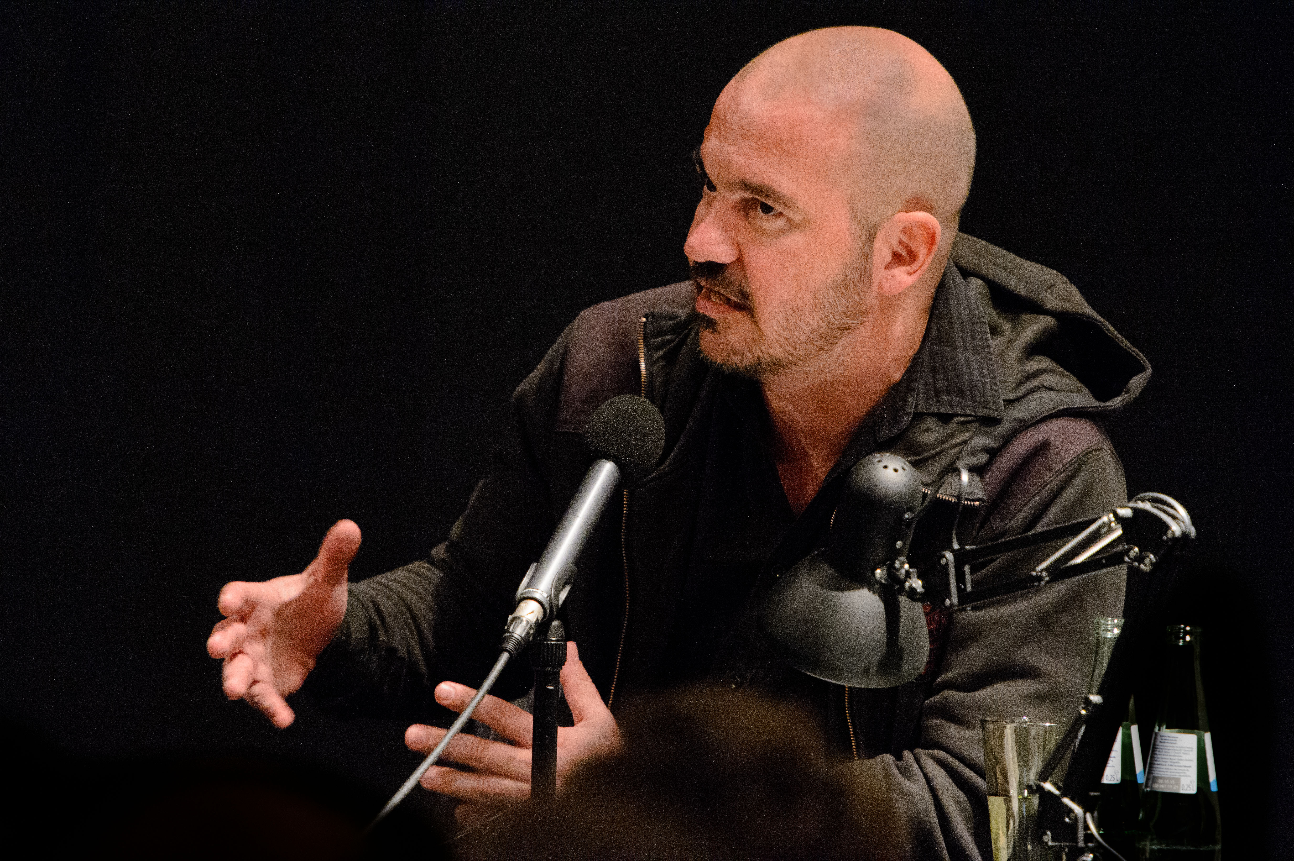 Thomas Glavinic (Schriftsteller, Österreich), Foto